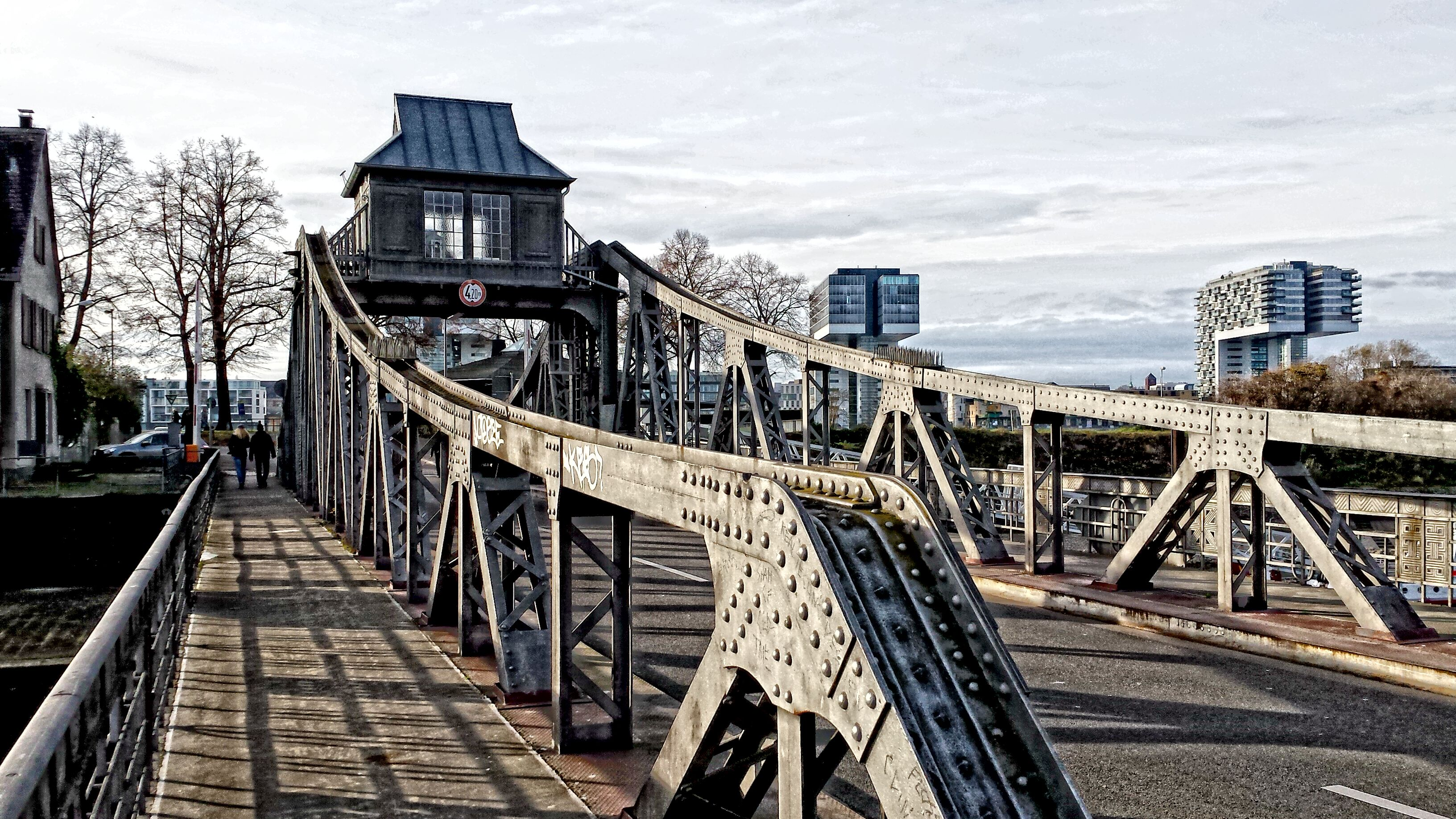 Eisendrehbrücke in Köln-Deutz